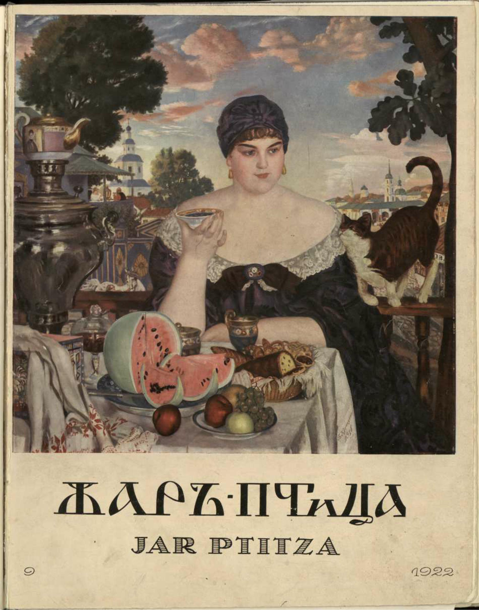 «Купчиха за чаем». Обложка